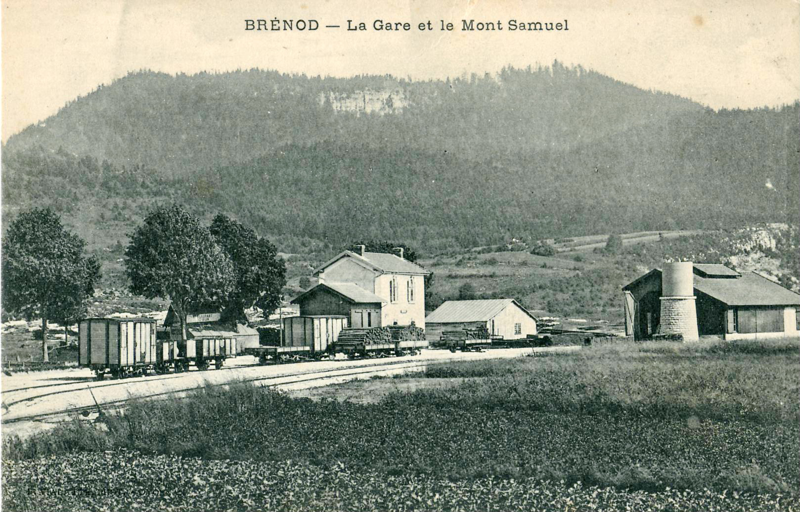 Carte postale ancienne éditée par Viala : BRÉNOD - La Gare et le Mont Samuel